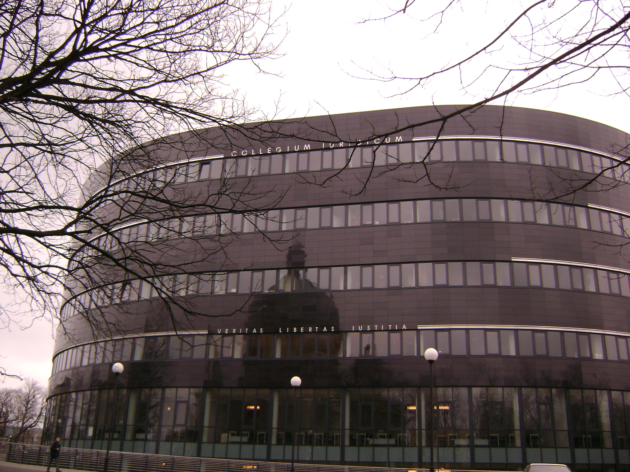 Budynek wydziału prawa Uniwersytetu Łódzkiego. W odbiciu budynku - kopuła kościoła św. Teresy.